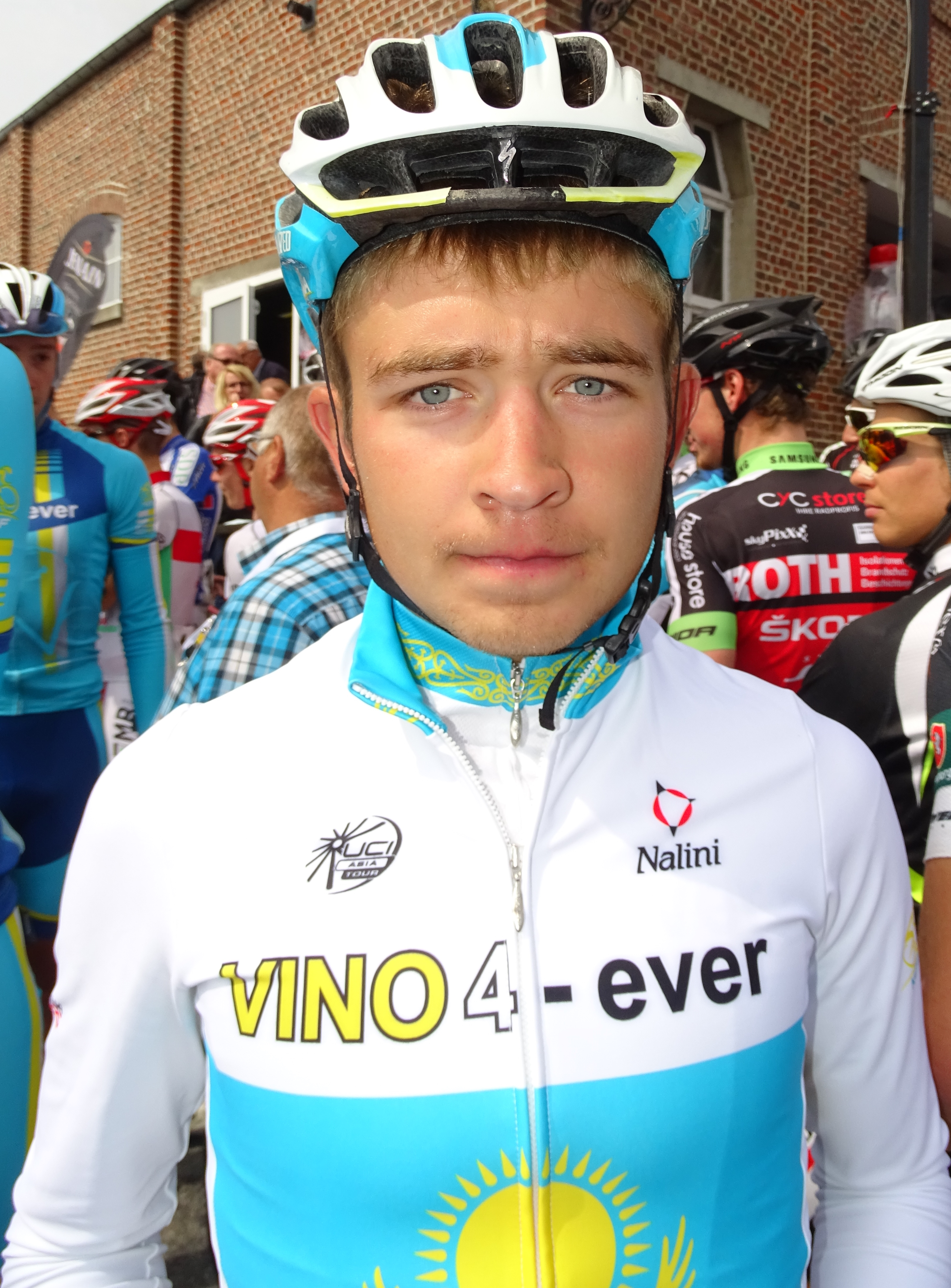 Reportage réalisé le mardi 25 août à l'occasion du départ et de l'arrivée du Grand Prix des Marbriers 2015 à Bellignies, Nord-Pas-de-Calais, France.